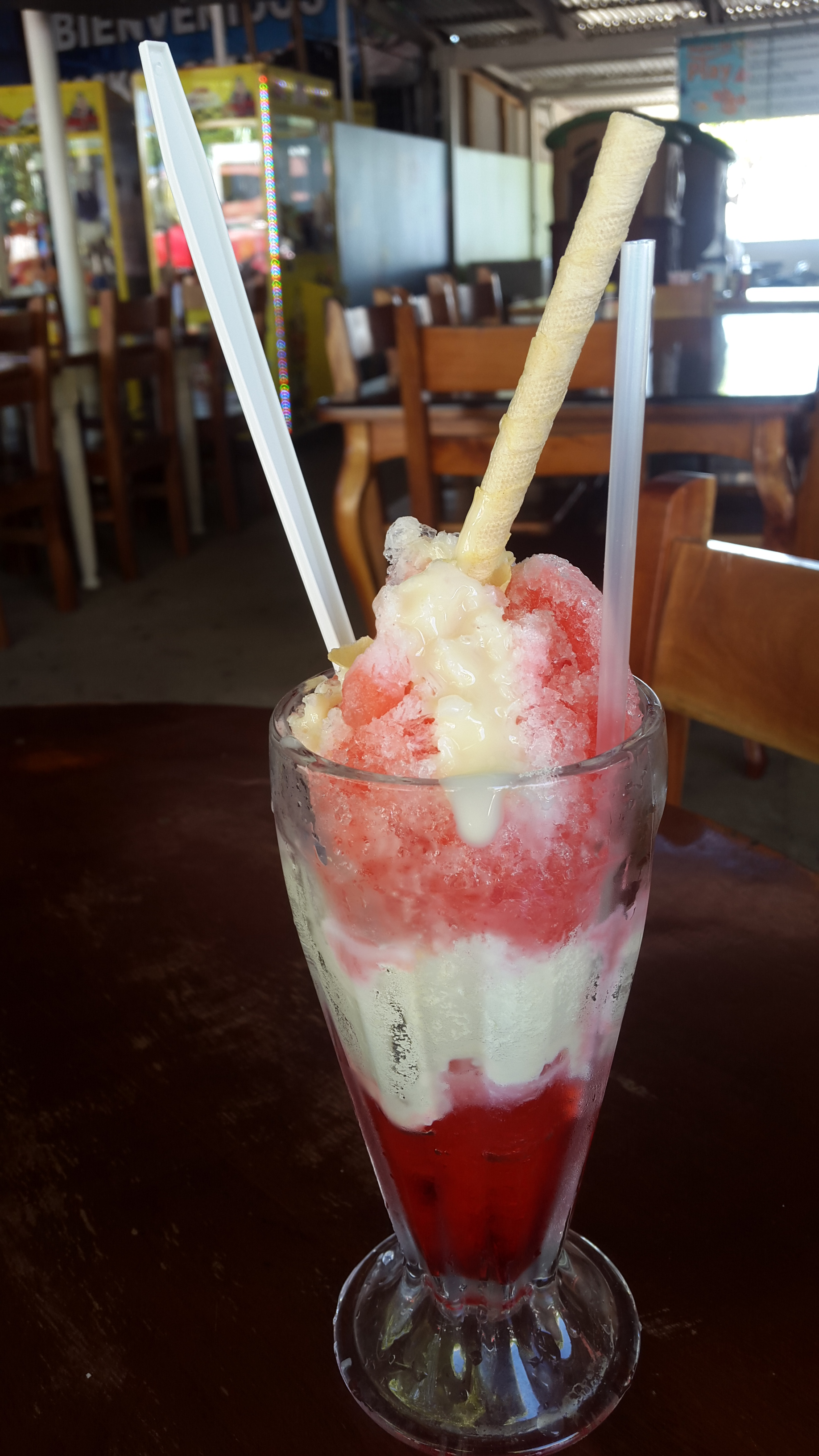 Granizado tipo Churchill, famoso postre de la ciudad de Puntarenas, Costa Rica.